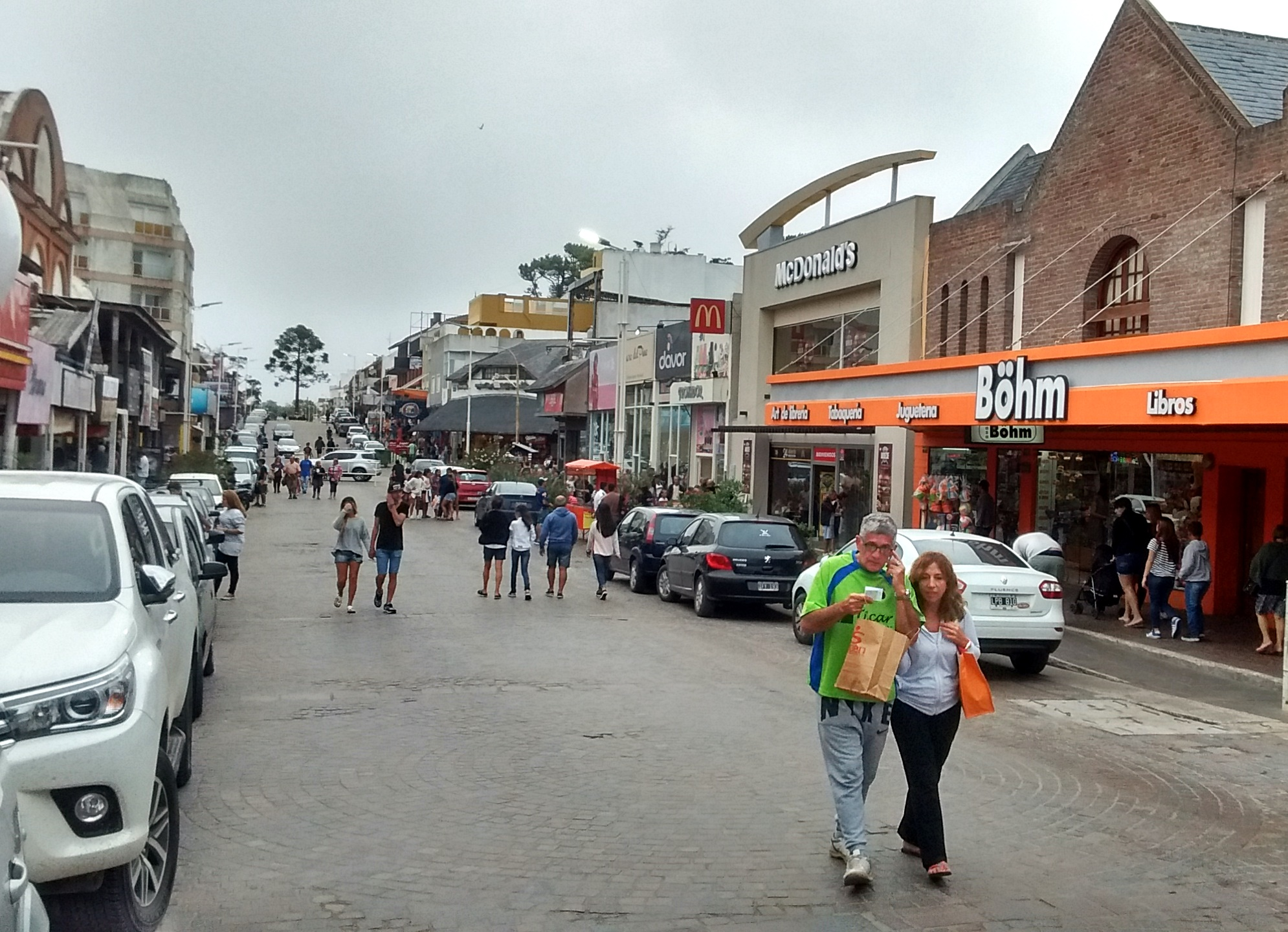 Avenida 3 al 400, entre 104 y 105. Provincia de Buenos Aires, Argentina.